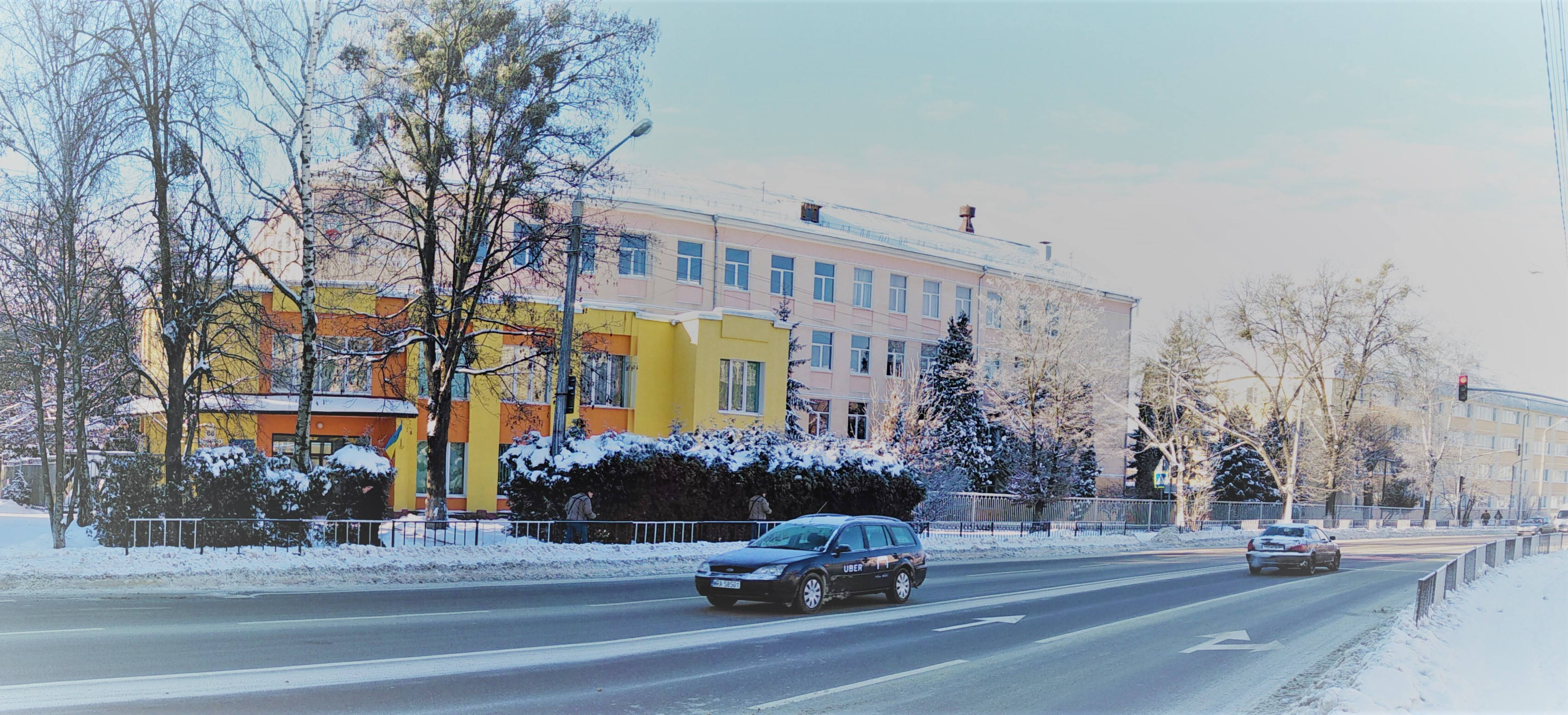 Вид на Ліцей з вулиці Пасічної, січень 2019 року.